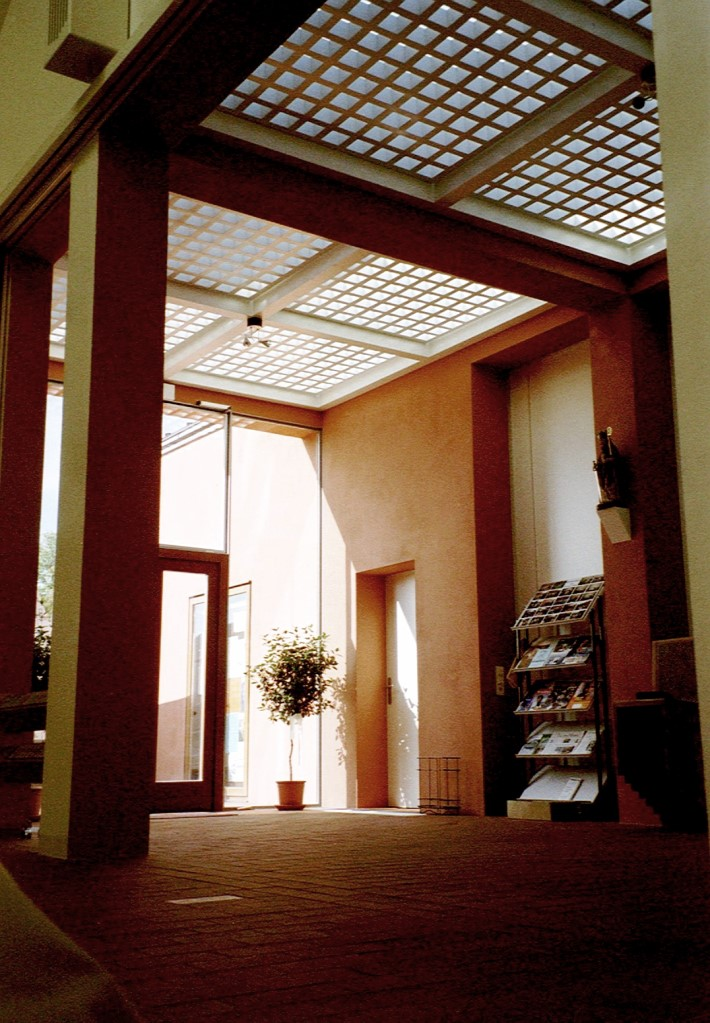 Kath. Kirche St. Kilian in Bad Liebenstein (Blick ins Foyer)